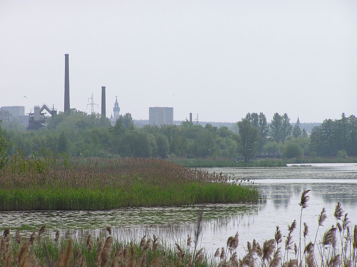 Starachowice, widok znad użytku ekologicznego (z grobli)